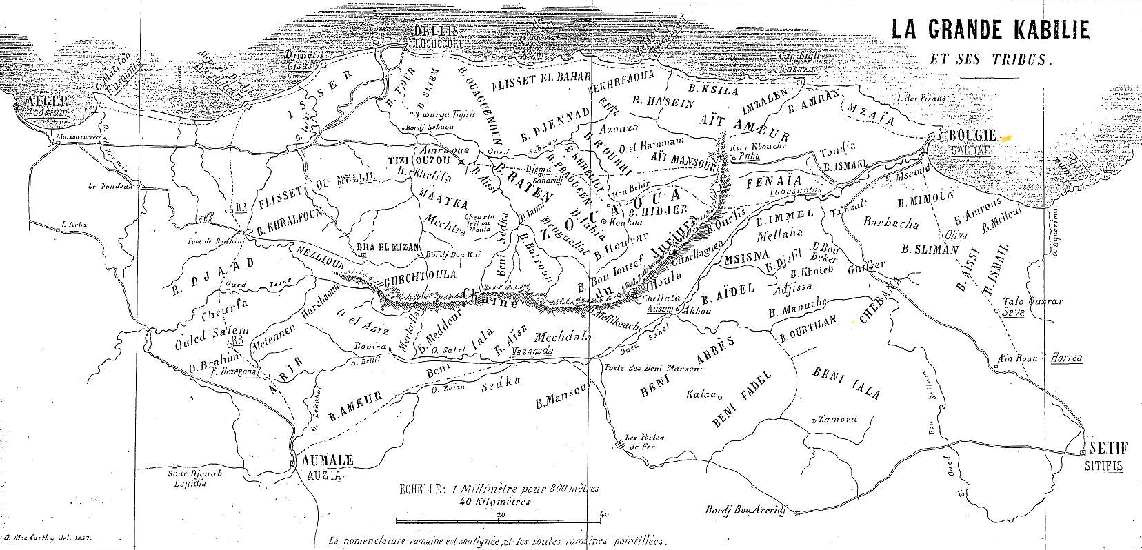 Carte de la Grande Kabylie et ses tribus (Algérie).